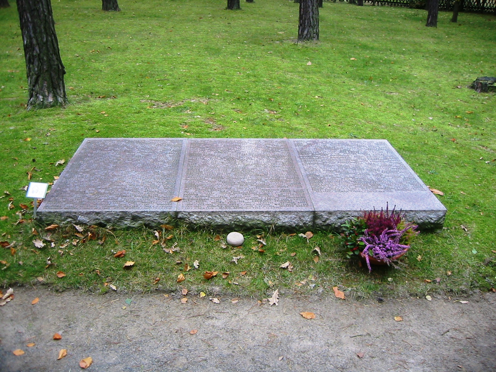 Zubettungen aus dem Lager Ketschendorf auf dem Waldfriedhof Halbe in der Gemeinde Halbe im Landkreis Dahme-Spreewald bei Berlin. Der Friedhof ist mit über 28.000 Opfern eine der größten Kriegsgräberstätten Deutschlands.